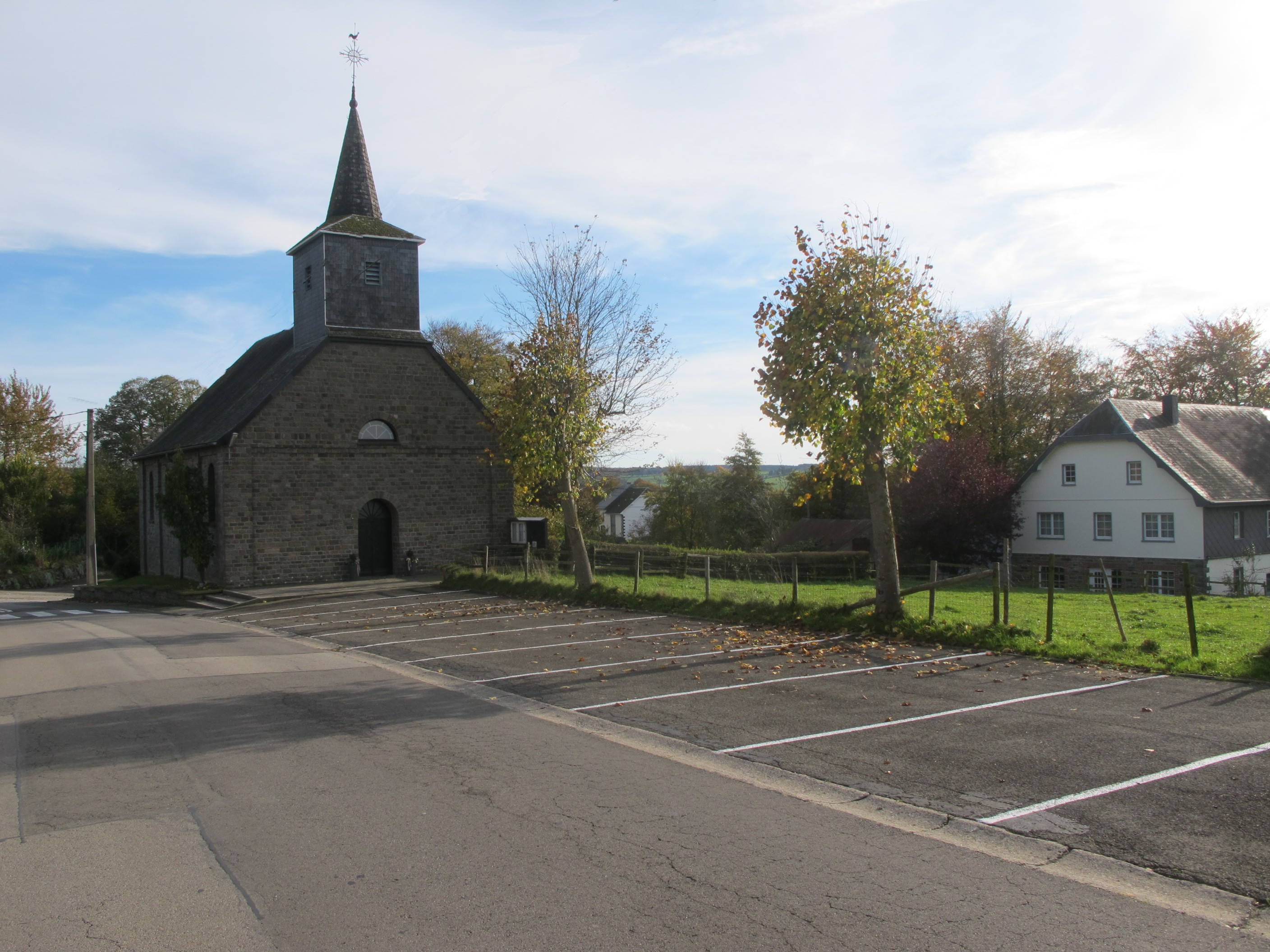 Kapelle von Mirfeld, Amel, Belgien